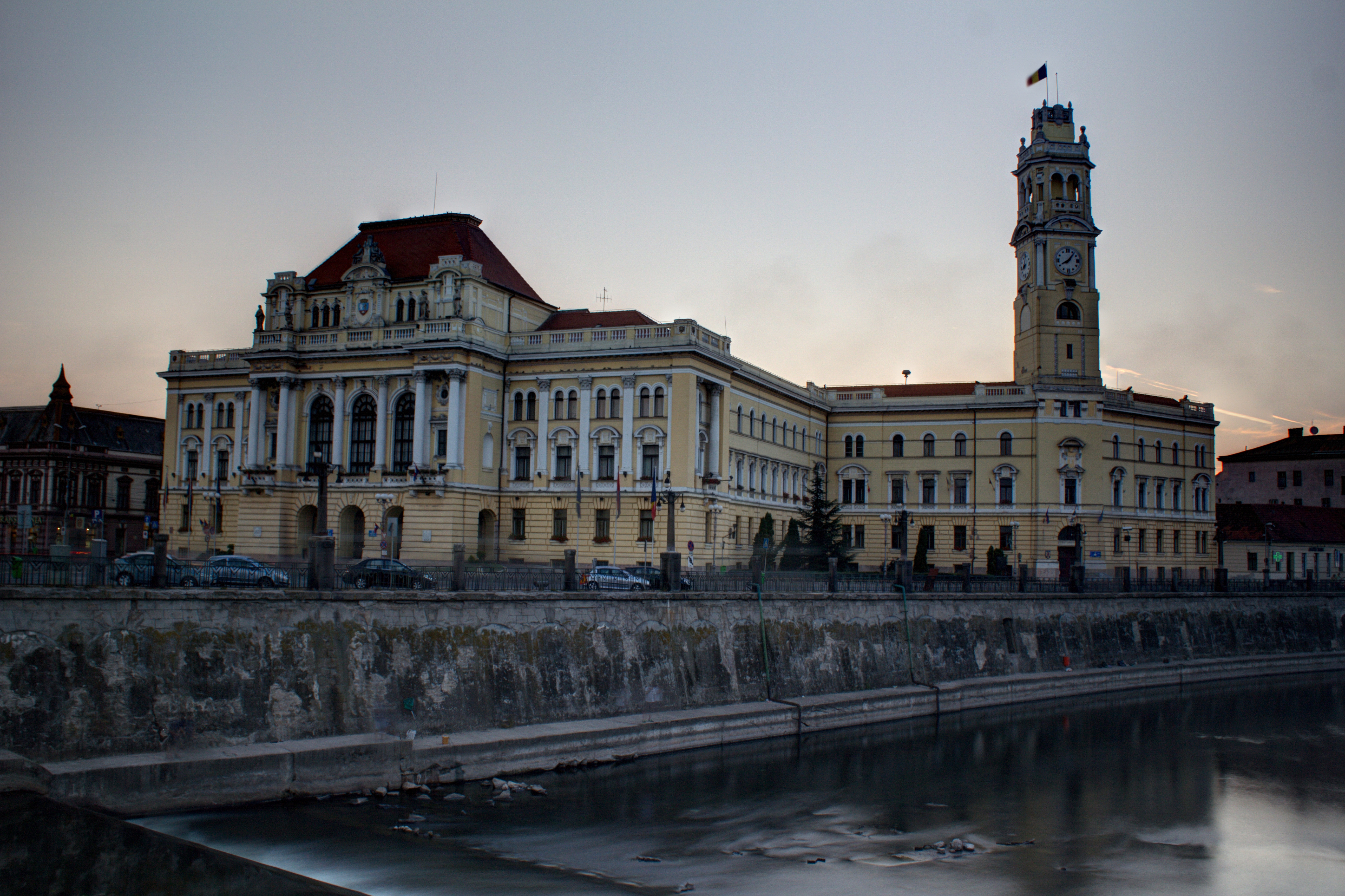 Primăria municipiului Oradea